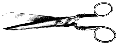 Handsax